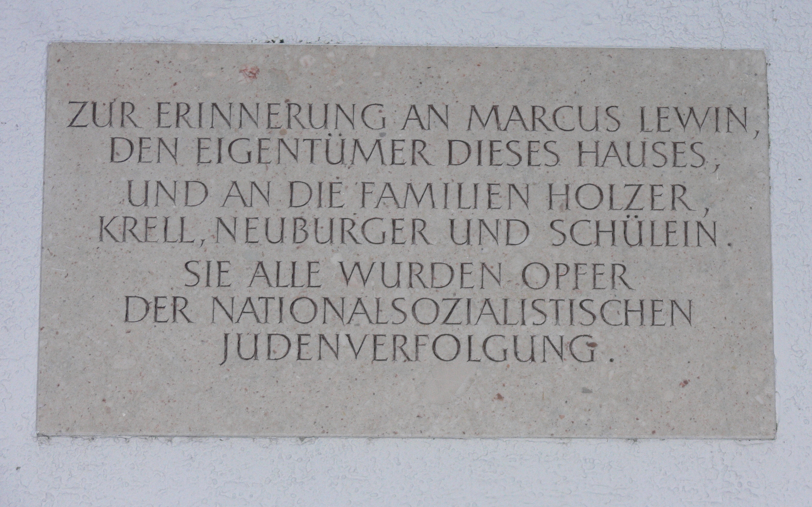 Gedenkstein für die Jüdische Familien in Freising, Hauswand Ecke Untere Hauptstraße Brennergasse, Freising, Bayern, Deutschland